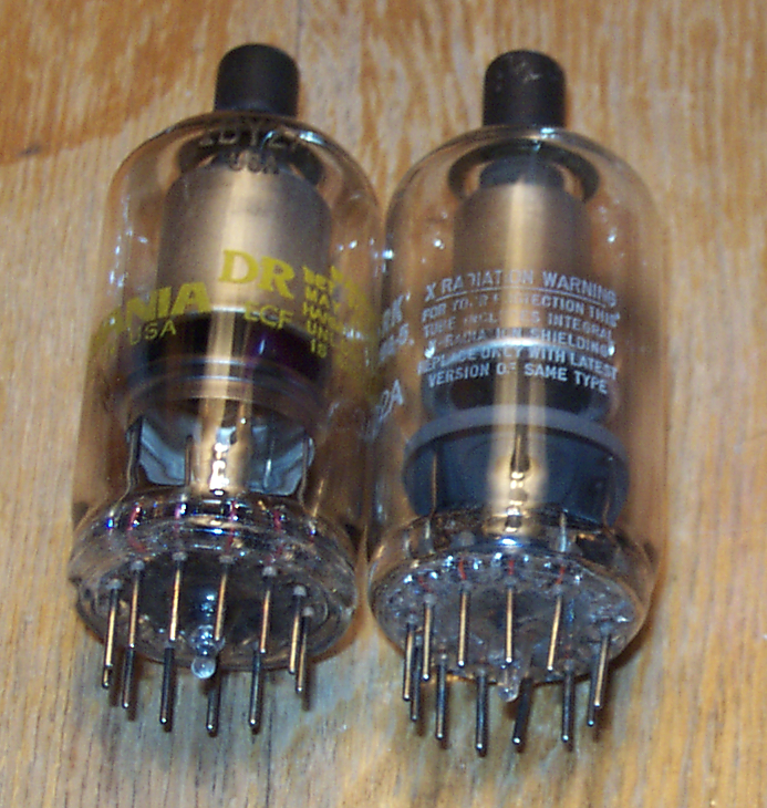 Tube à rayon X, Photographie par l'utilisateur Su37amelia de la Wikipédia anglophone.